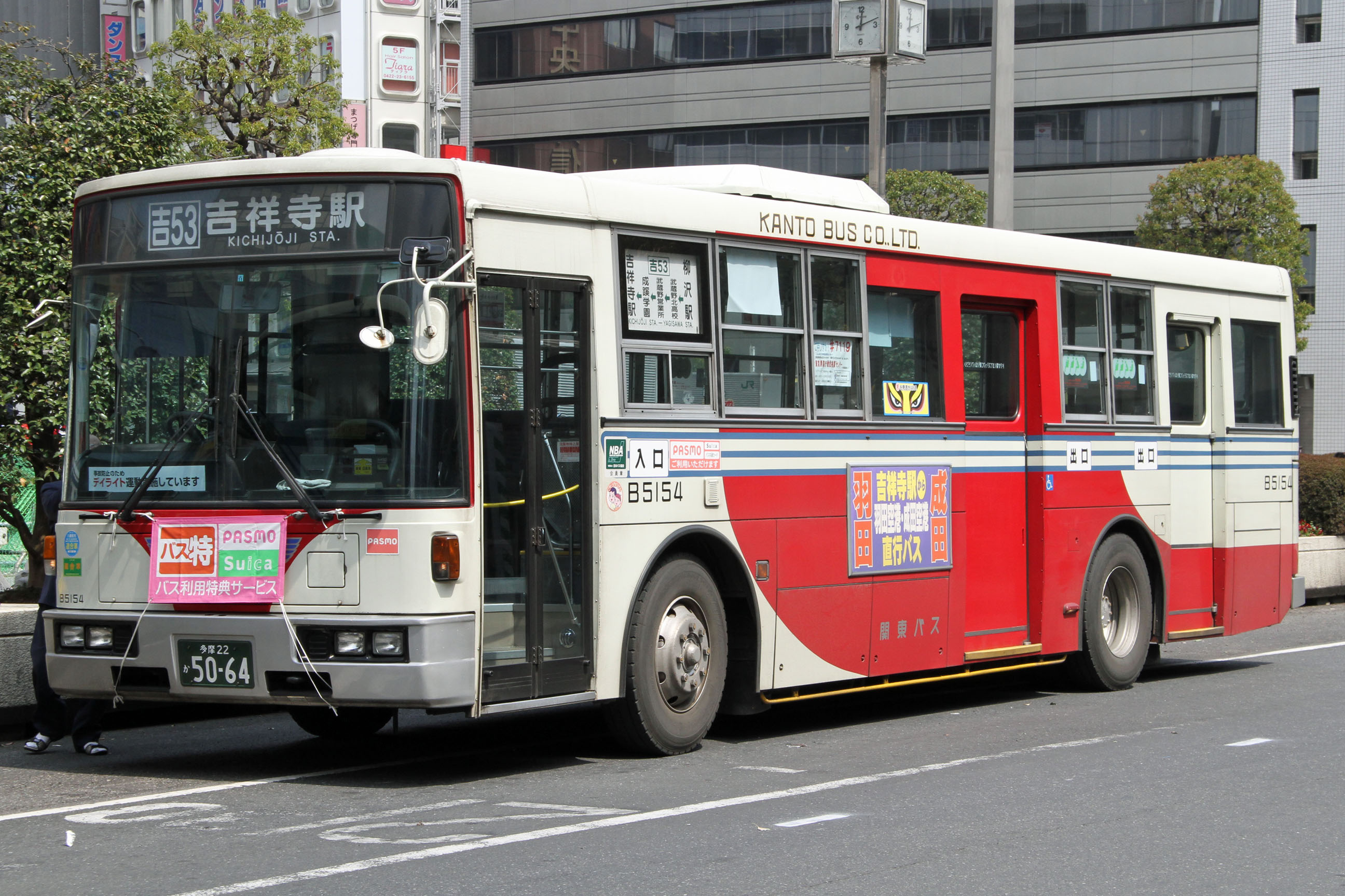 Kanto Bus car 関東バスの車両